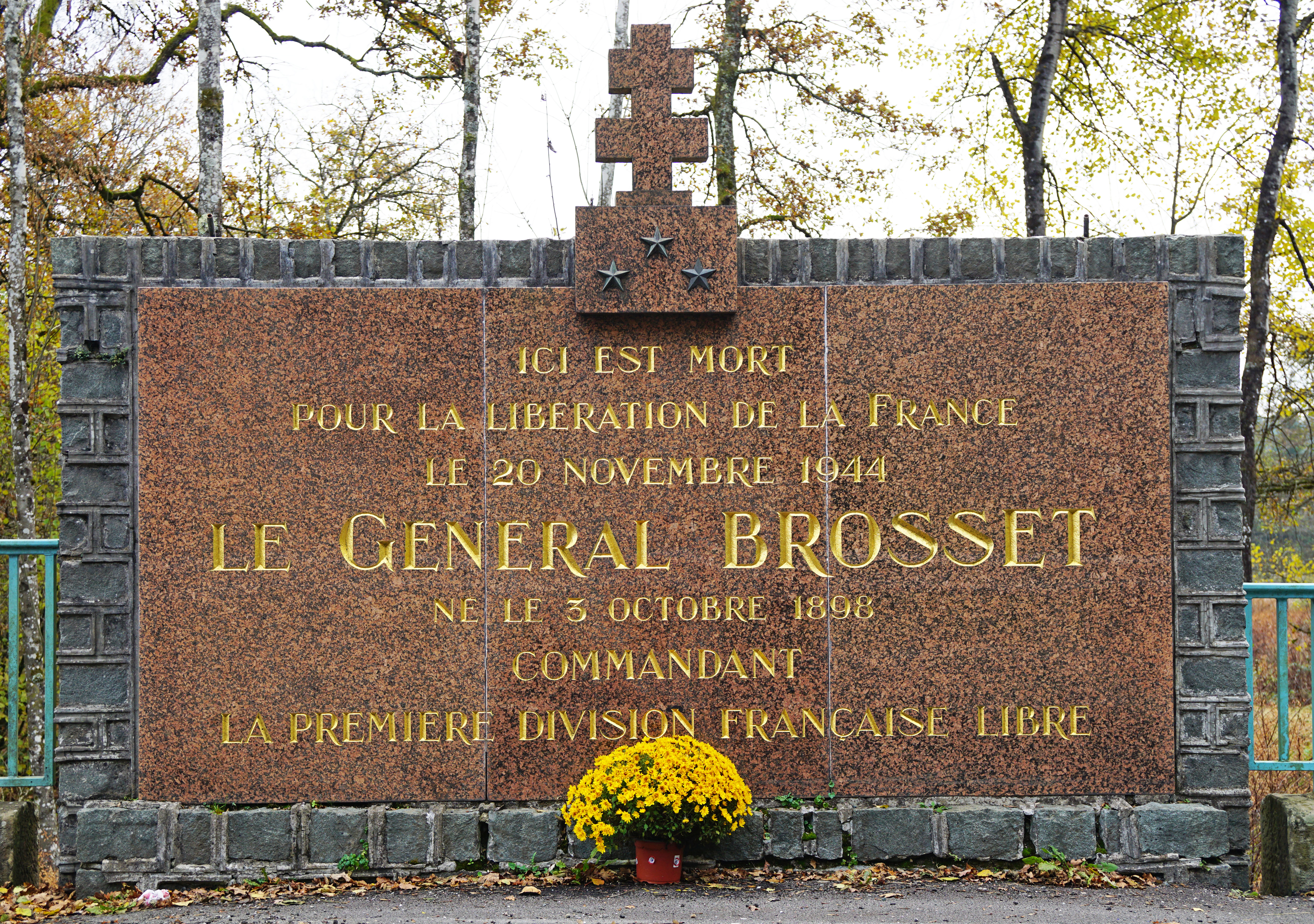 Plaque rendant hommage au général Diego Brosset sur le lieu de son accident.